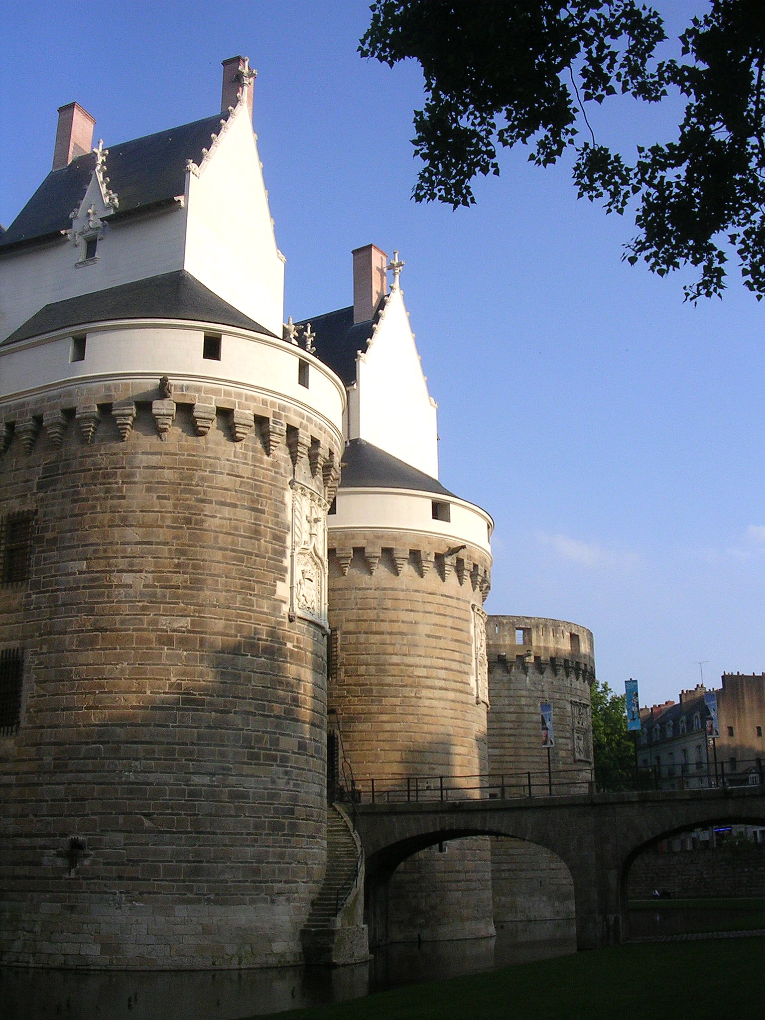 Château des ducs de Bretagne, tours du Pied-de-Biche, de la Boulangerie et des Jacobins. Nantes (France)